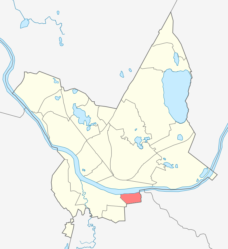 Микрорайон Юдовка карте Даугавпилса.